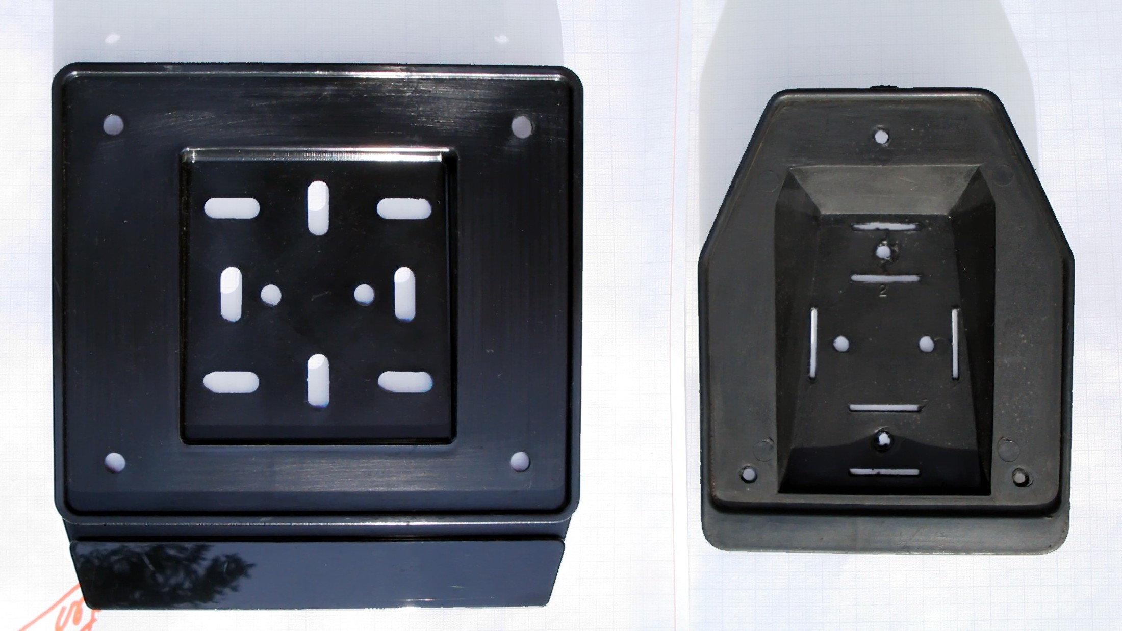 Porta-targhe per ciclomotore, munite di bandella per scritte pubblicitarie